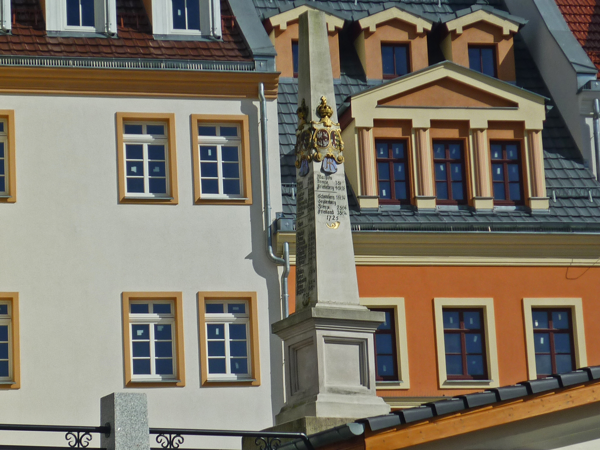 Alte sächsische Postmeilensäule in Zgorzelec in der ul. Wroclawska (neu errichtet 2014)